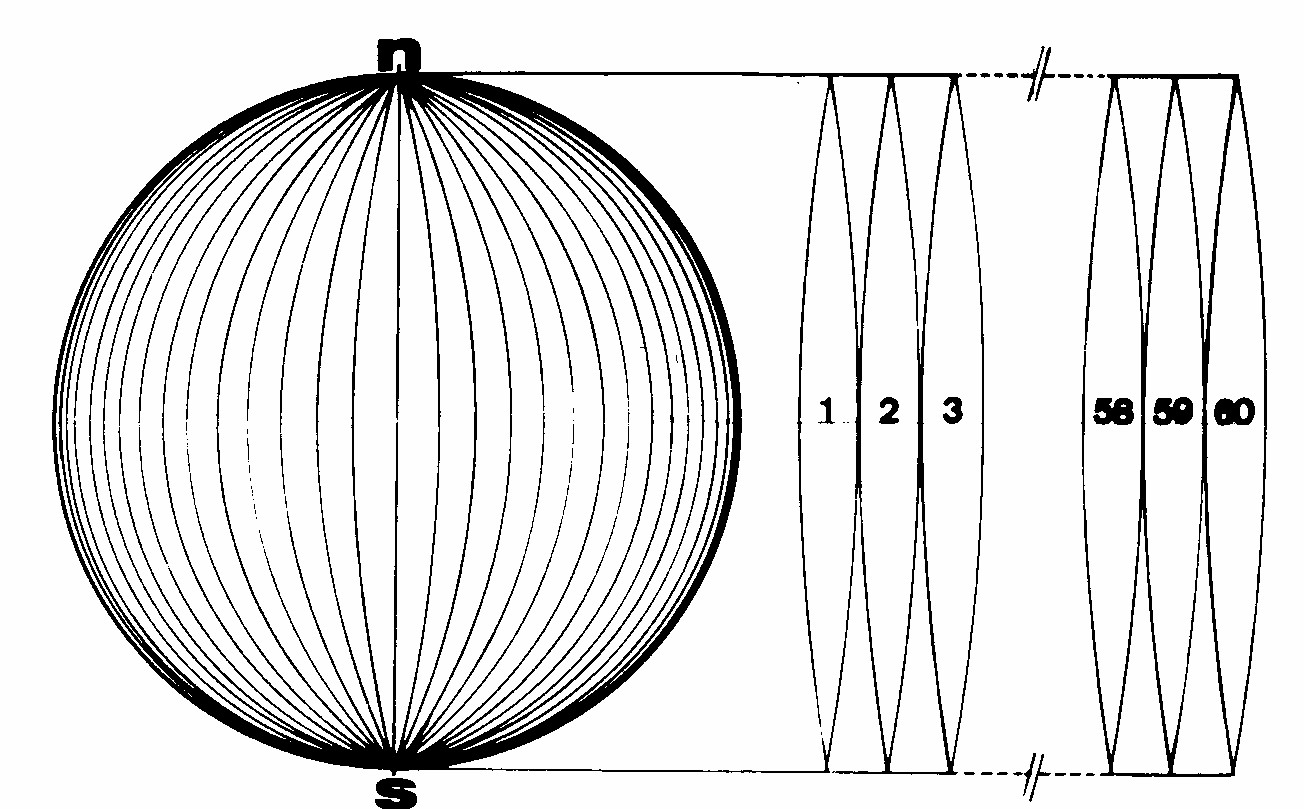 UTM-Koordinatesystem: Fuseauen.